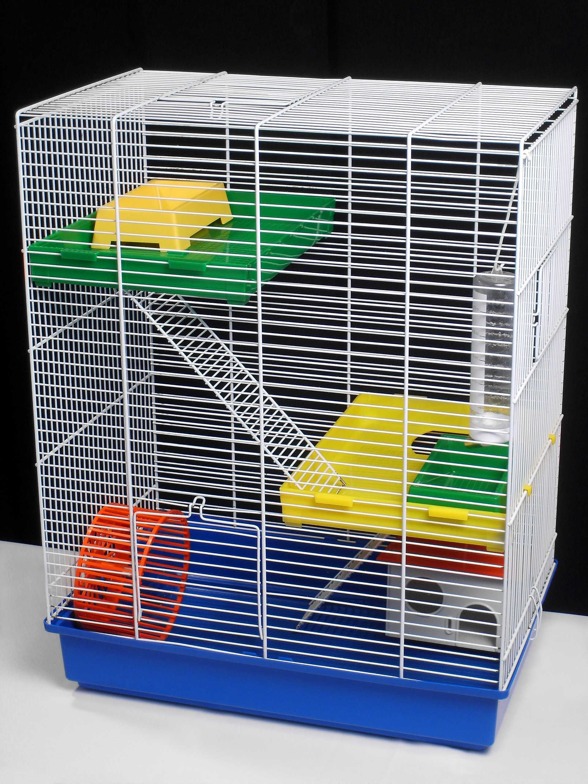 Jaula para roedores. Cuenta con tres niveles, dos escaleras, dos comederos, un bebedero, una casa y una rueda de ejercicios. Hecha por la compañía italiana de productos para mascotas Ferplast.